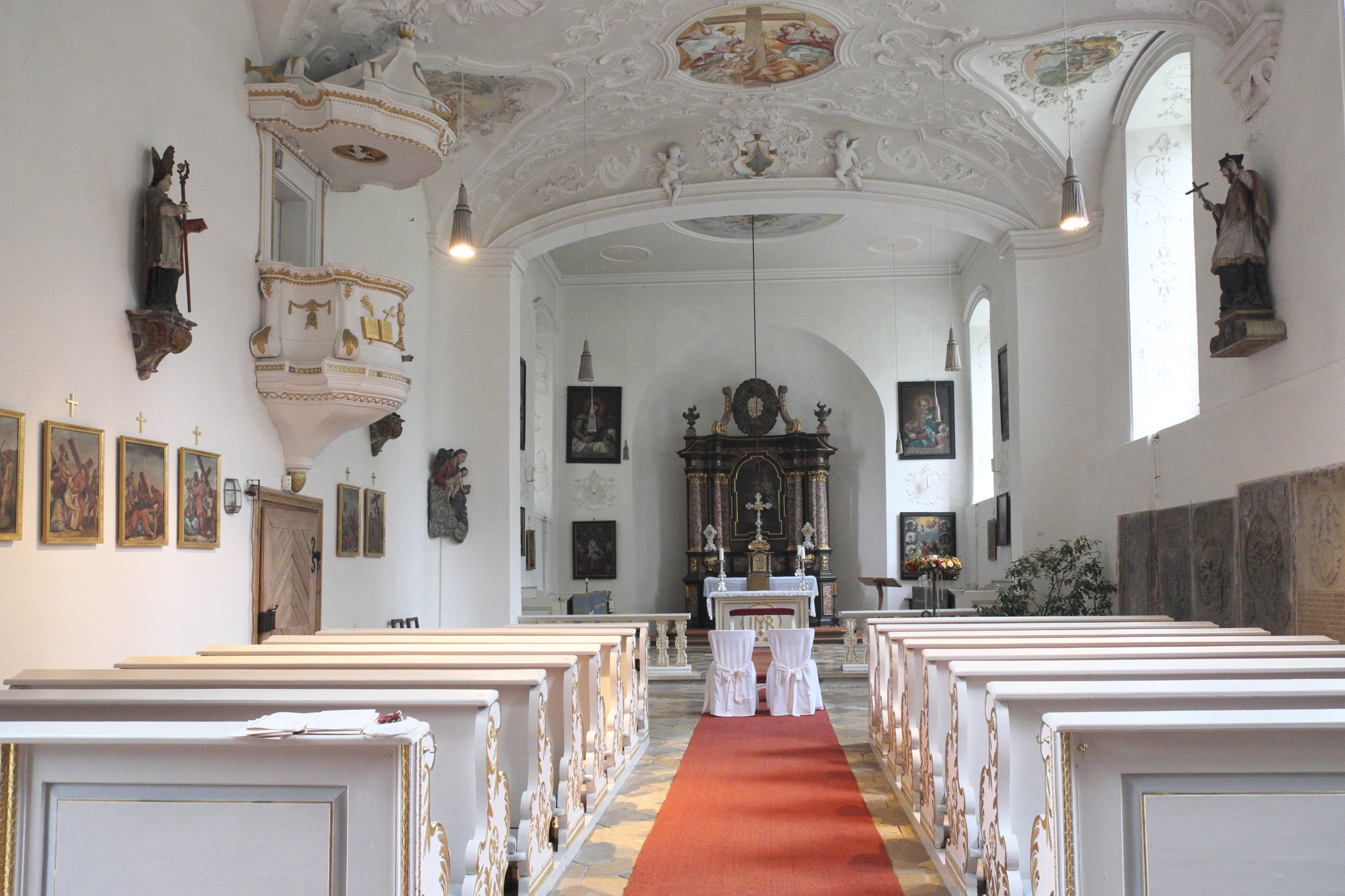 Ehemaliges Deutschordensschloss, Schloss Blumenthal, in Klingen, einem Stadtteil von Aichach im Landkreis Aichach-Friedberg (Bayern), ehemalige Schlosskapelle, katholische Filialkirche St. Maria, Innenraum